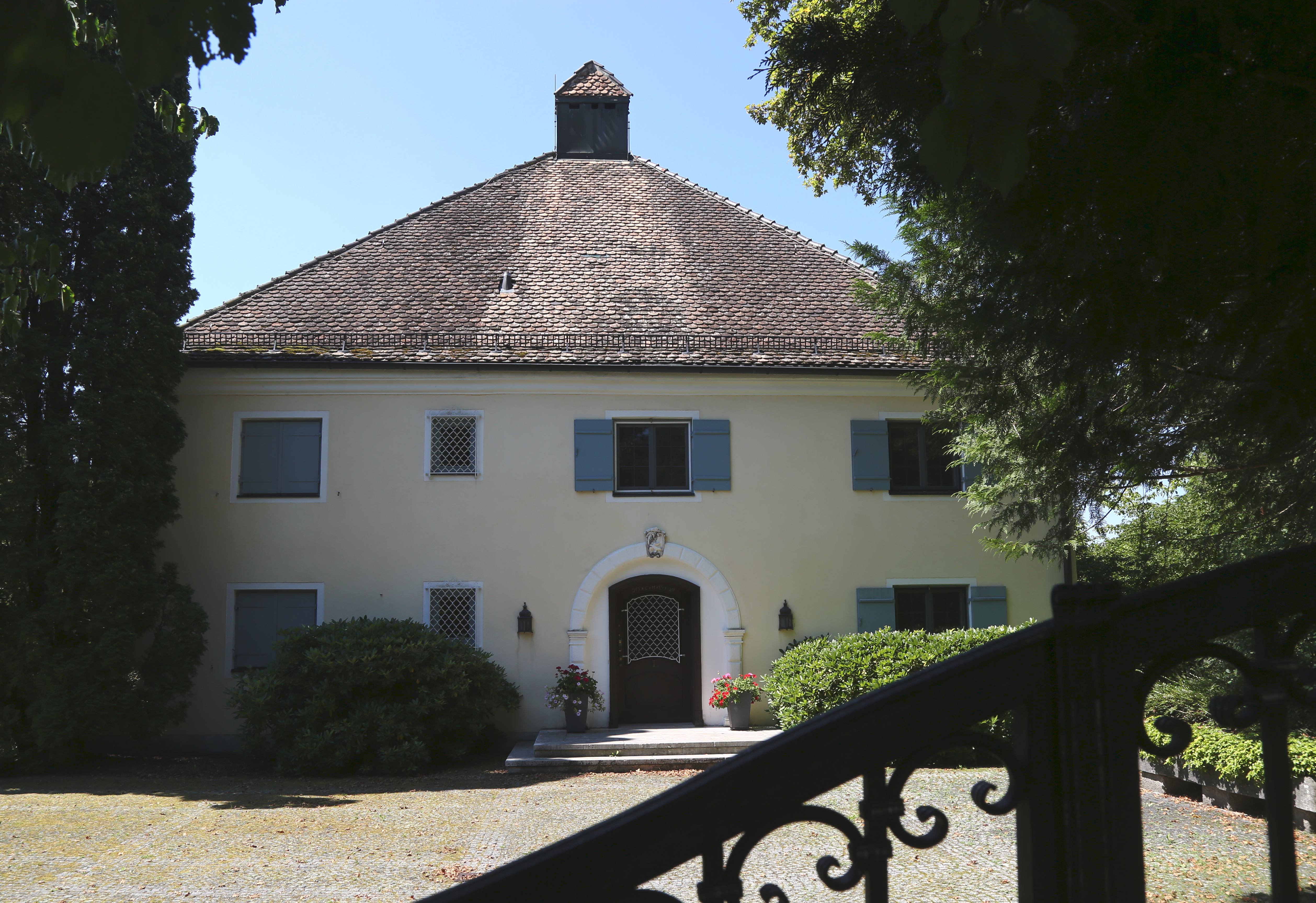 Gut Rothsee, Landkreis Weilheim-Schongau